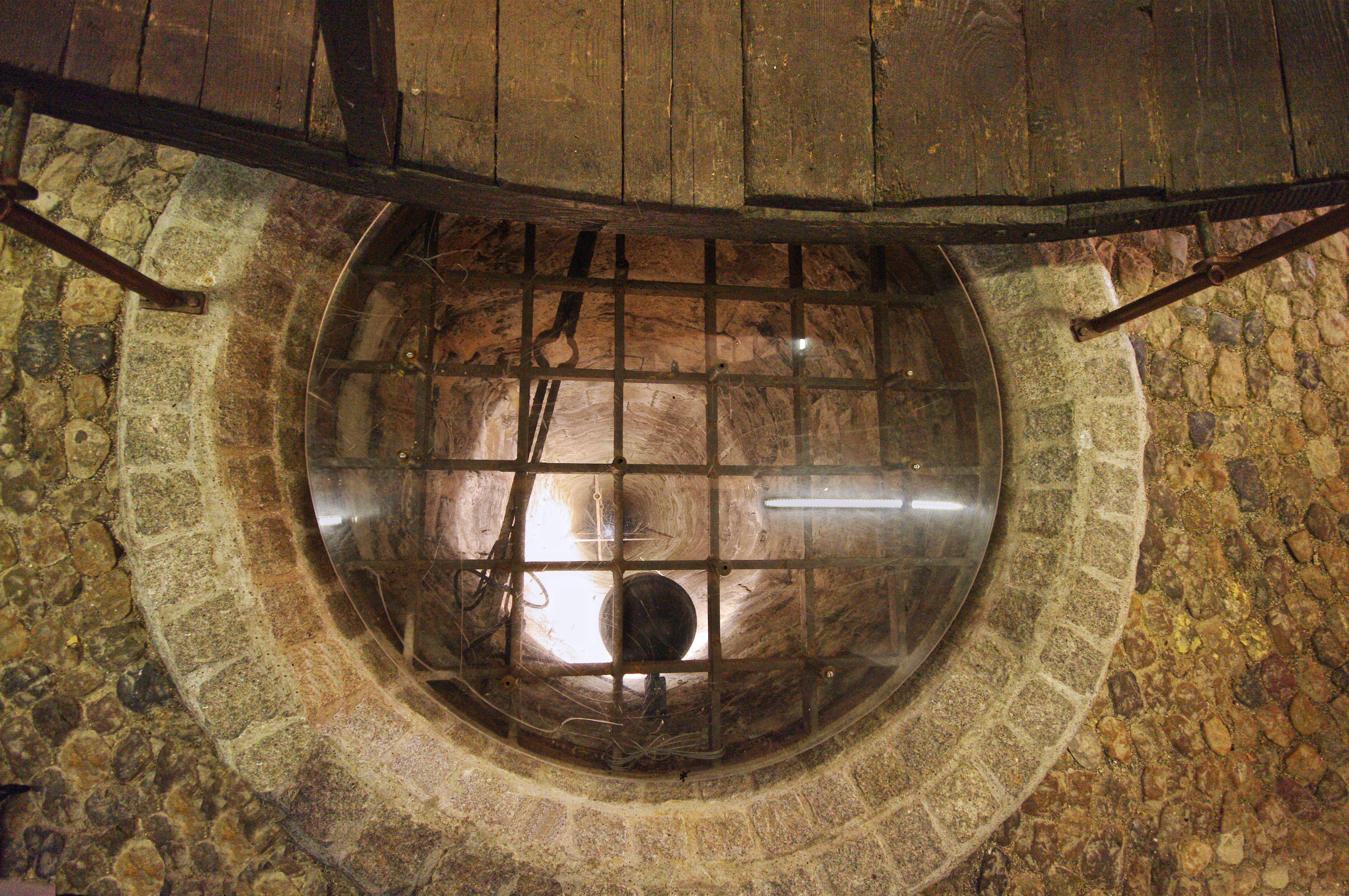 Bilder aus Breisach am Rhein Blick in den Brunnen 41 m tief